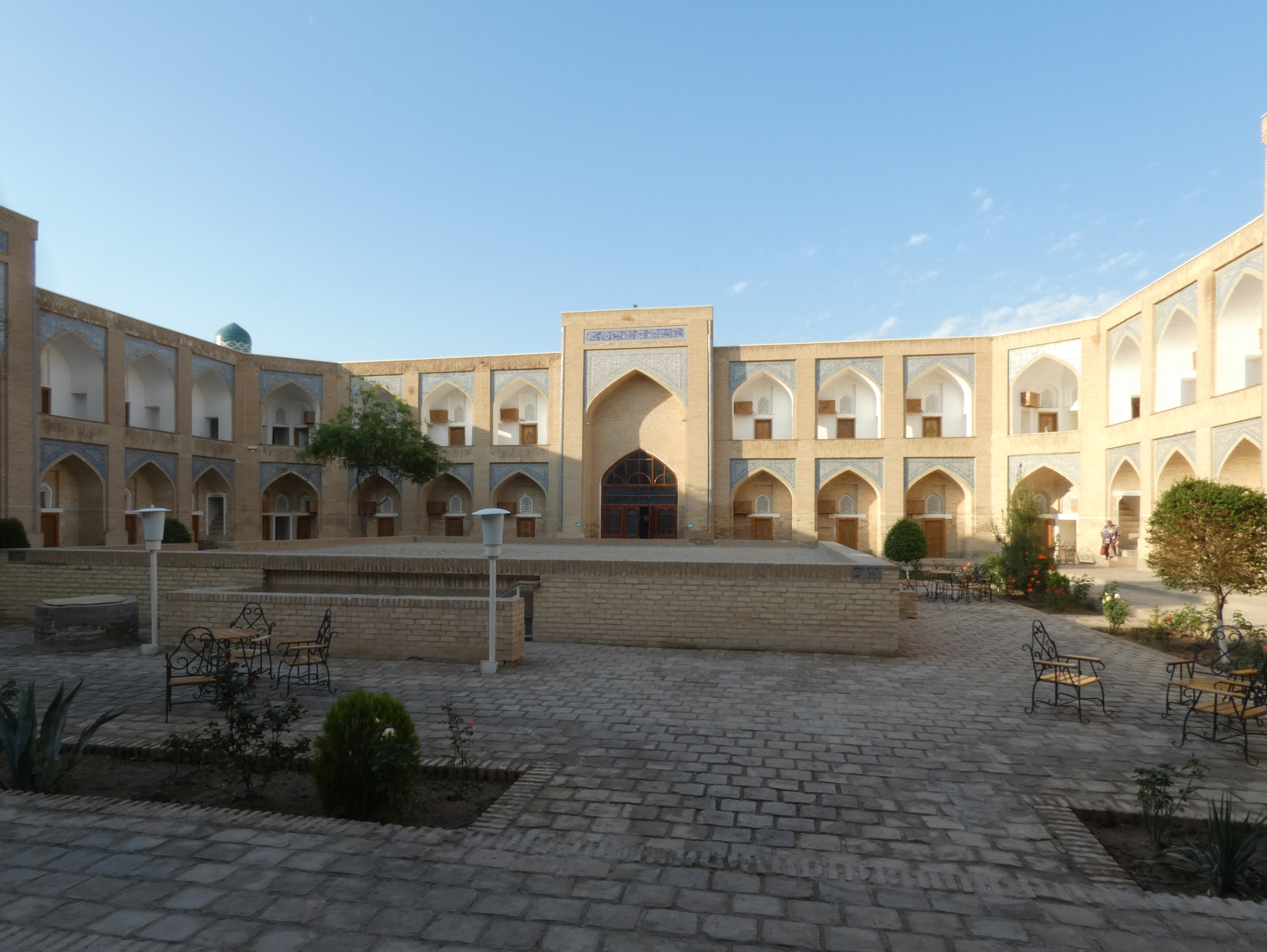 Medrese Muhammad Amin Khan, Hofbereich, Blick auf die Südseite, Chiwa